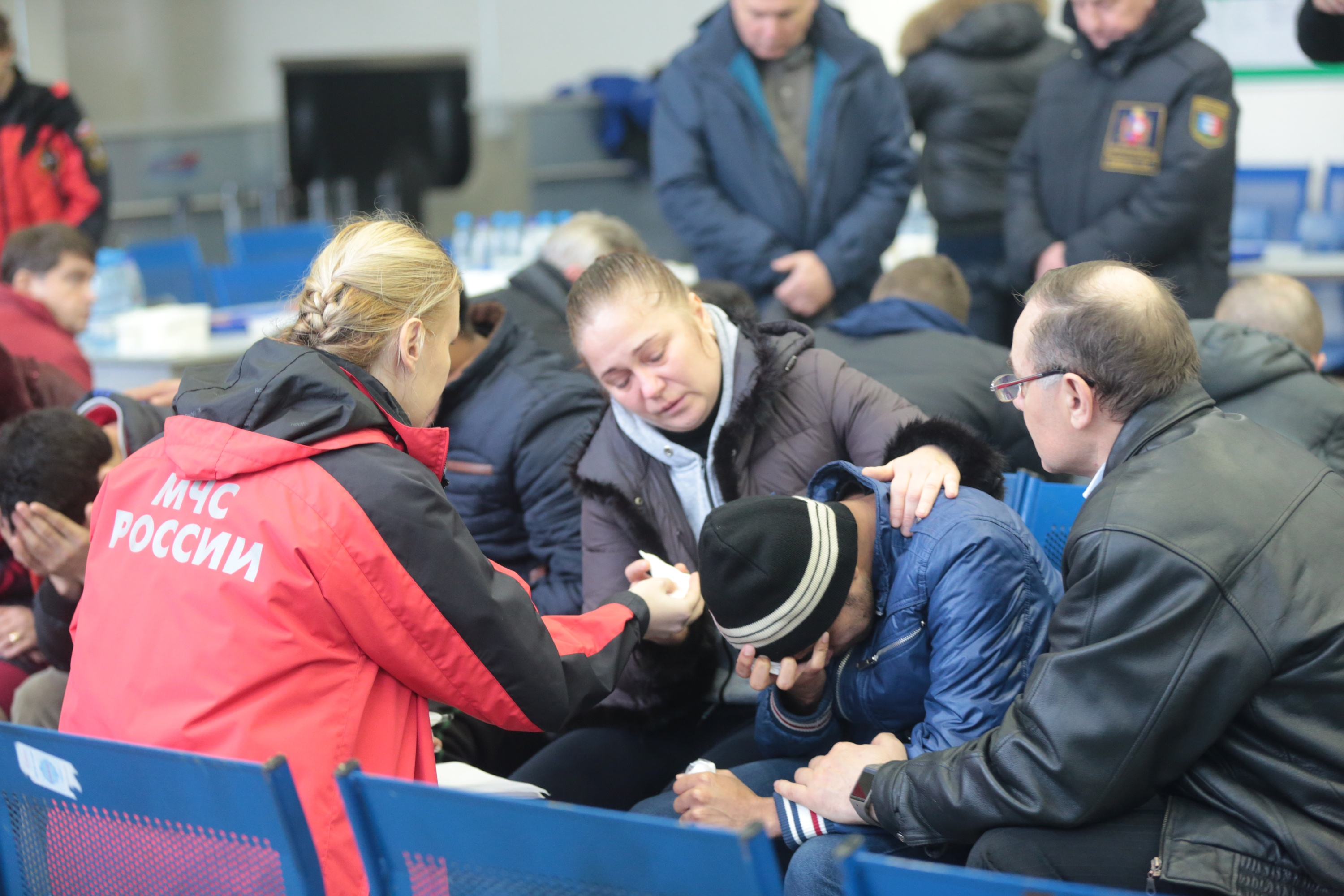 Авиакатастрофа в Ростове-на-Дону